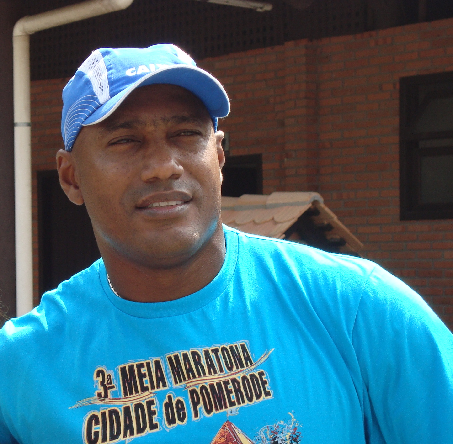 Claudinei Quirino